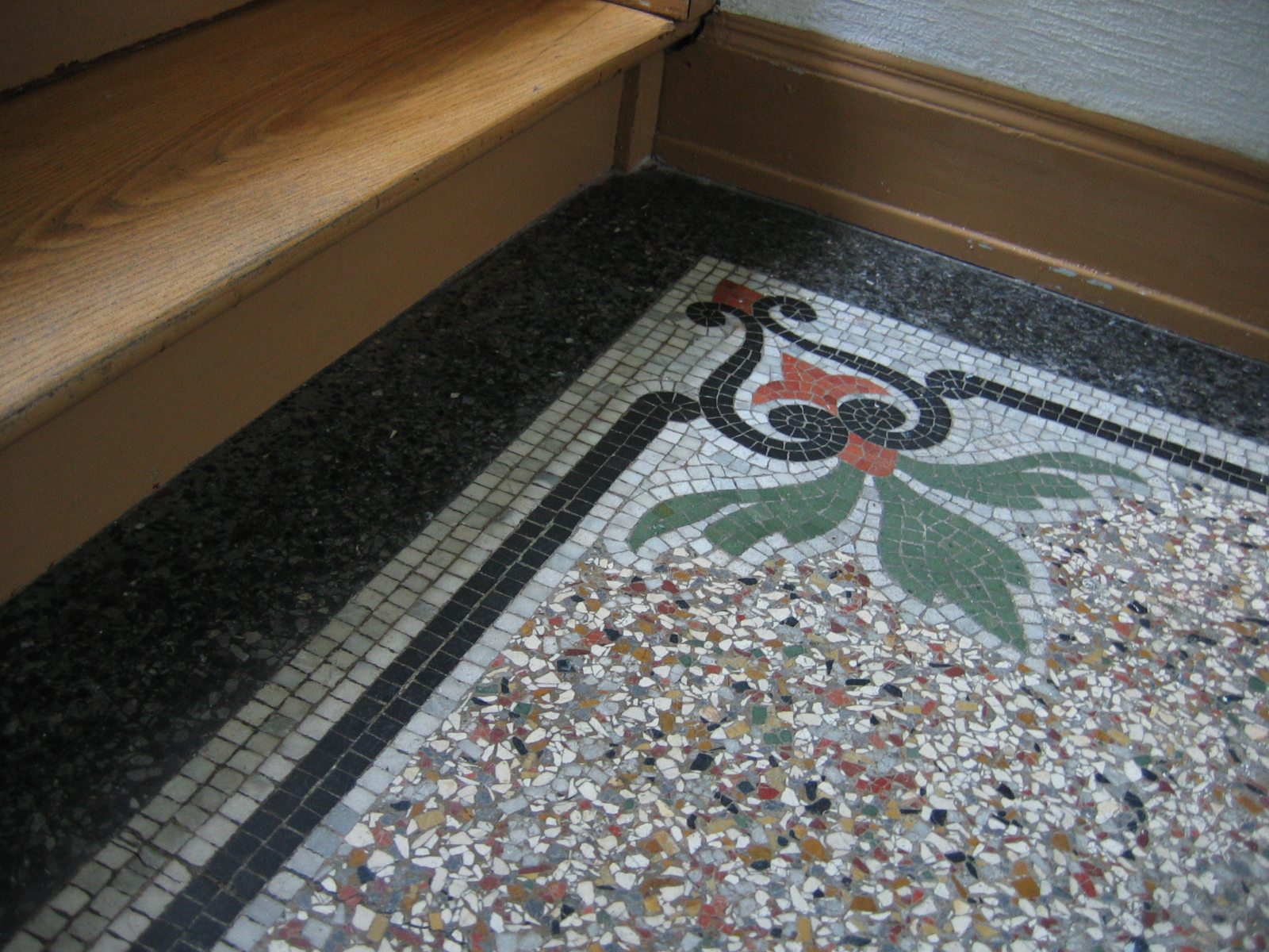 Terrazzo Mosaik Boden in einem Heidelberger Treppenhaus